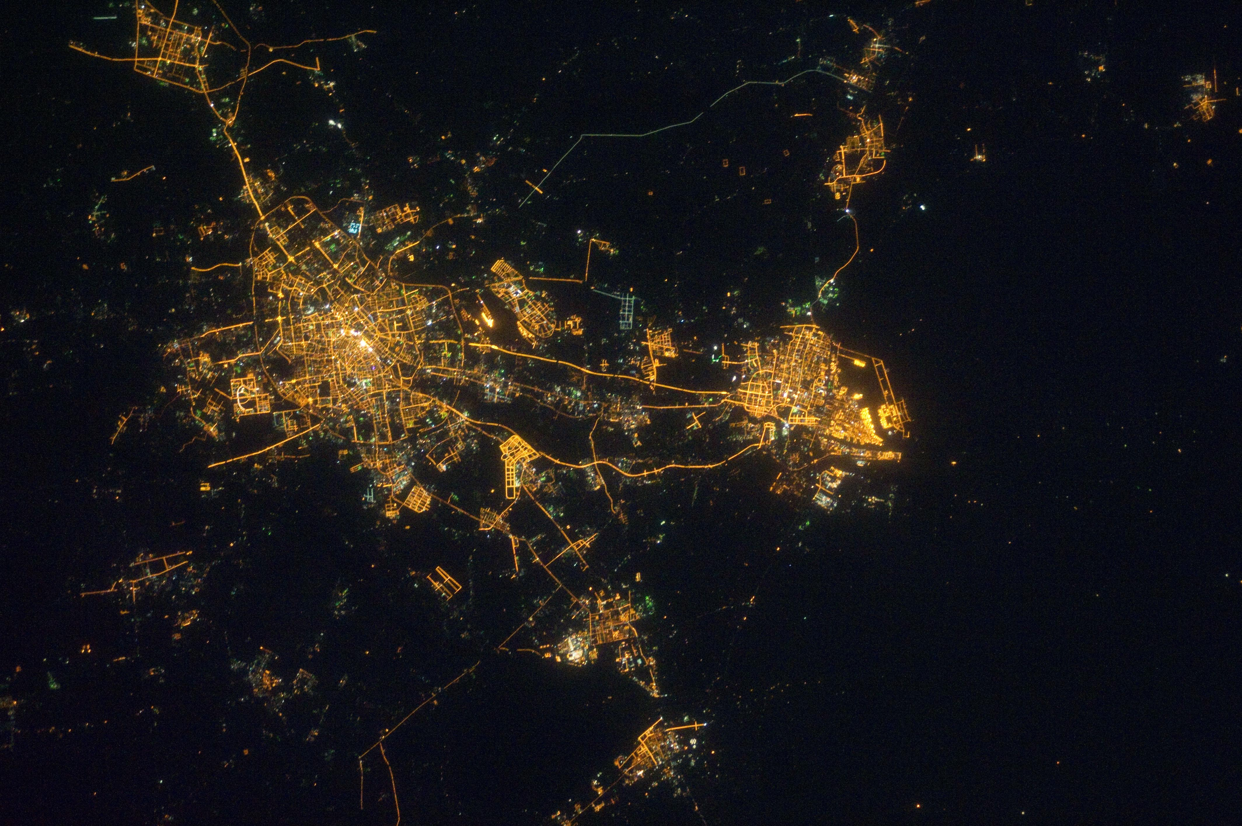 美国宇航局的原创作品